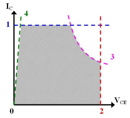 Transistor_BJT_puissance